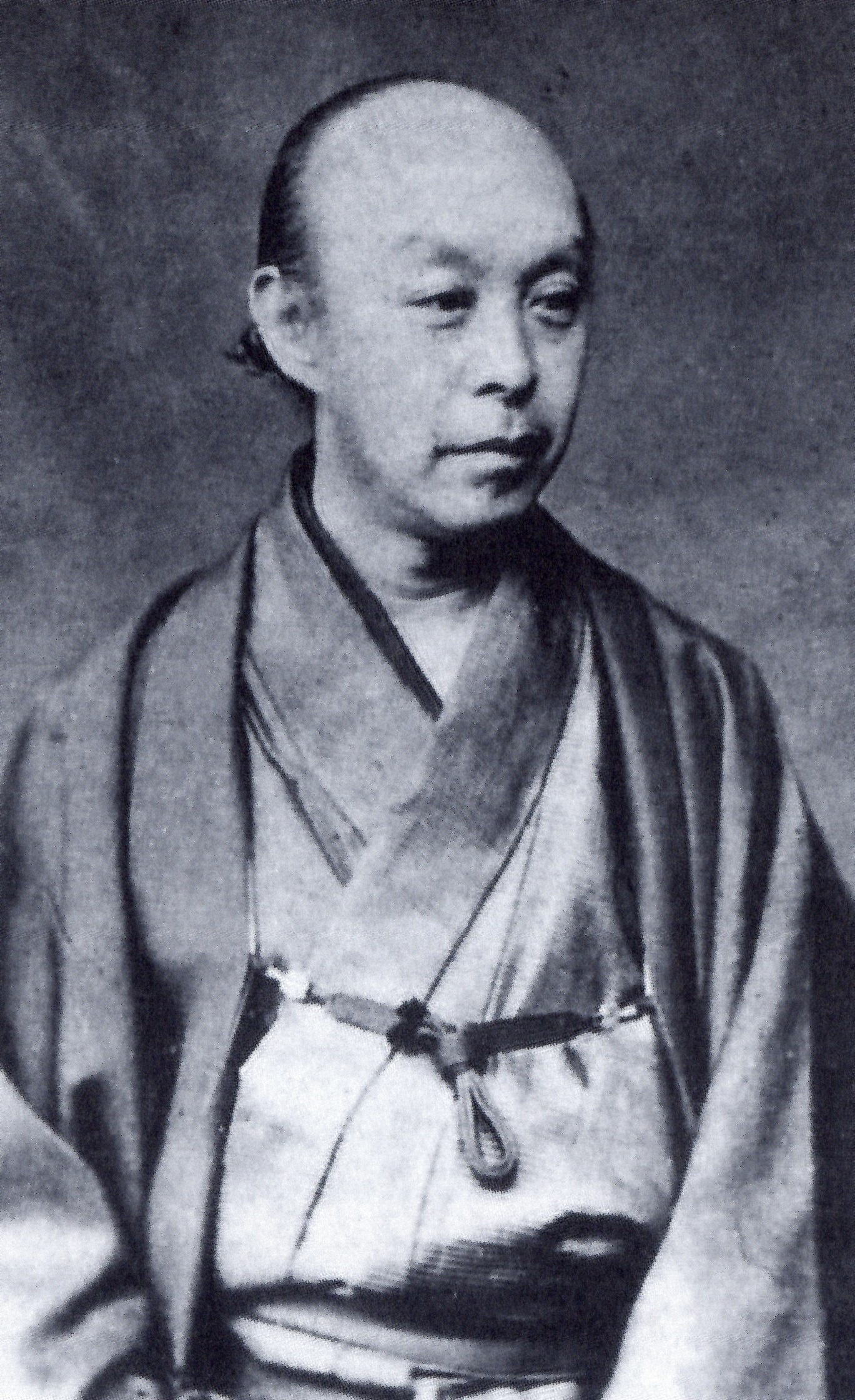 永井尚服の肖像。